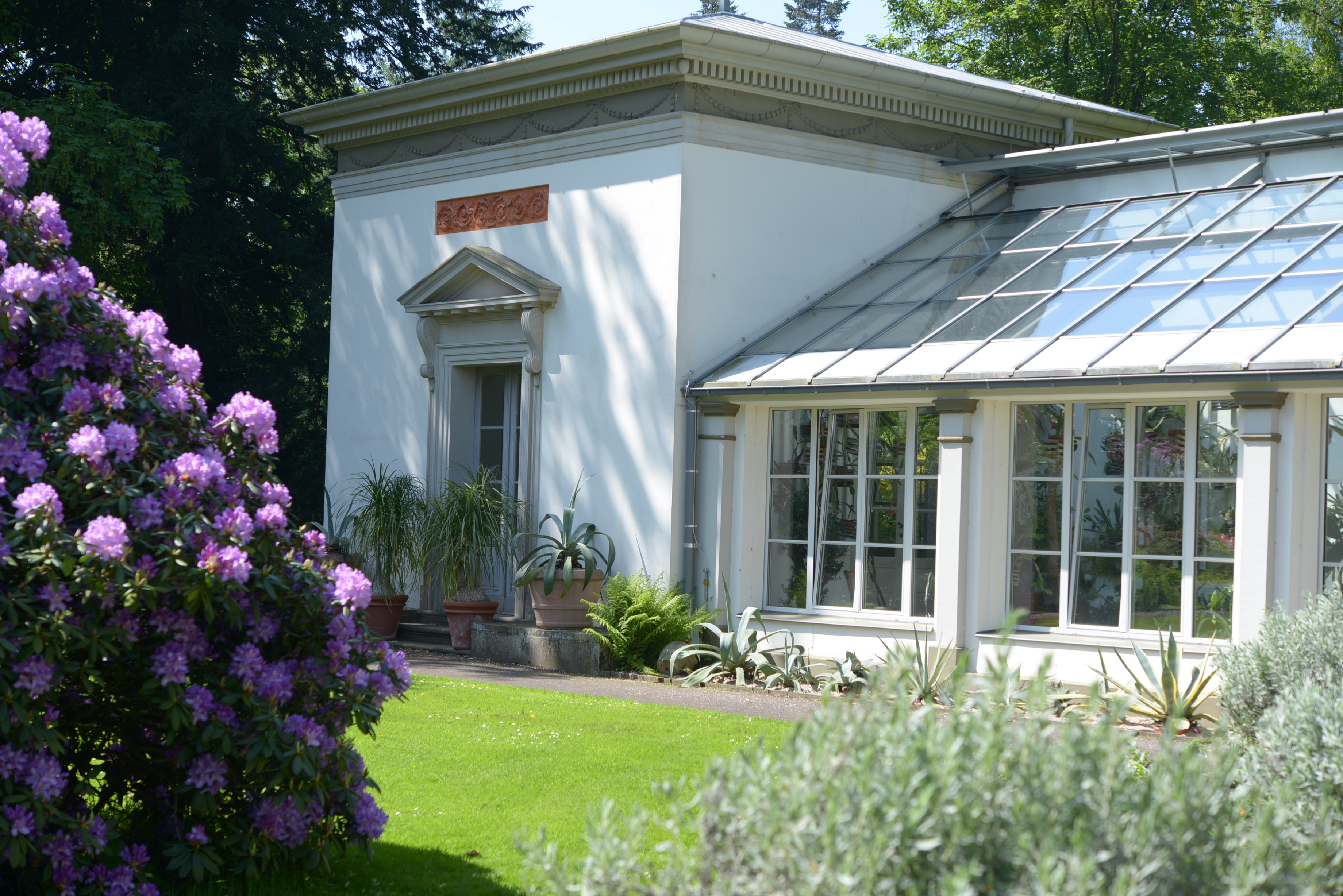 Flowerhouse